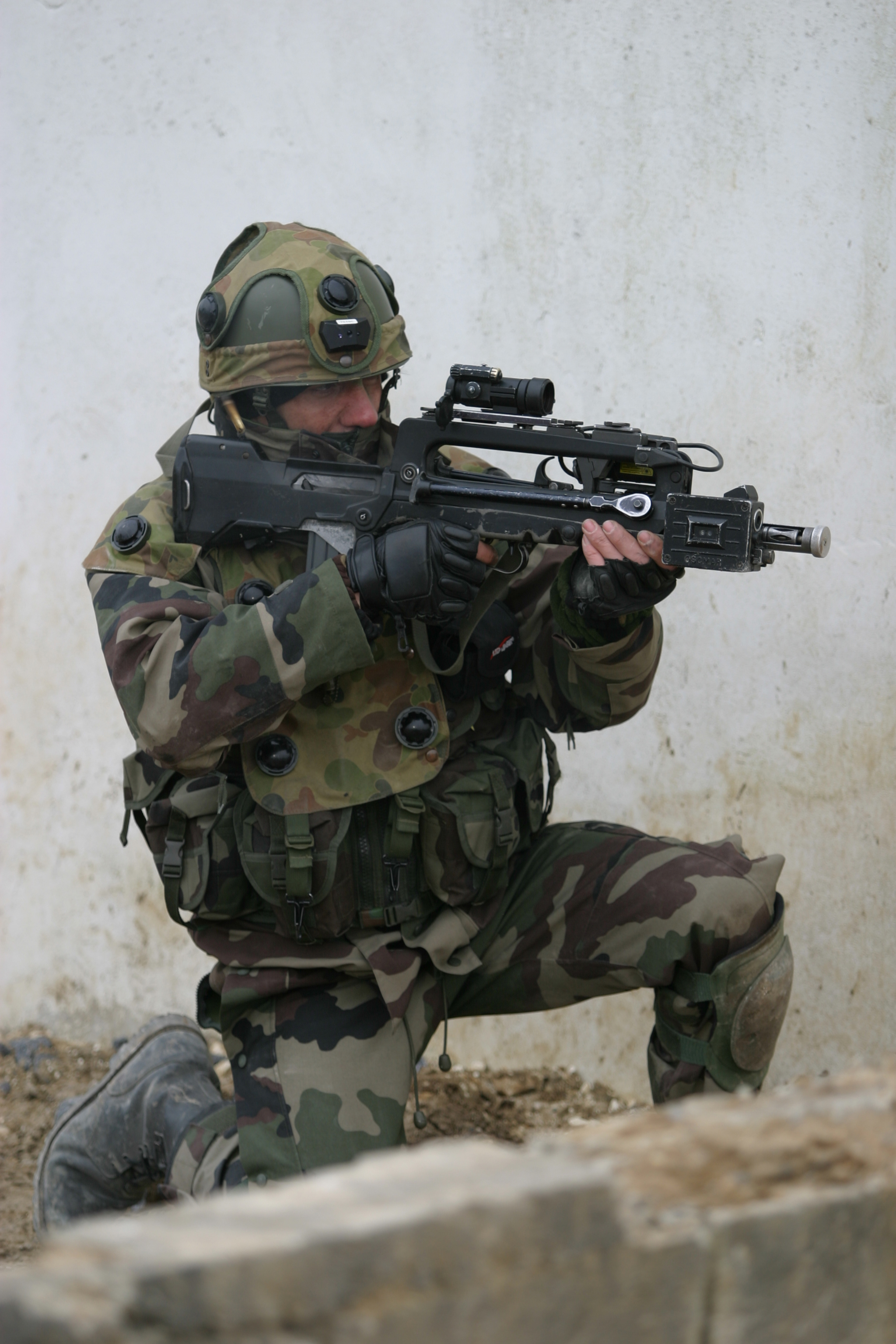 Fantassin du 2e REI au CENZUB en février 2007